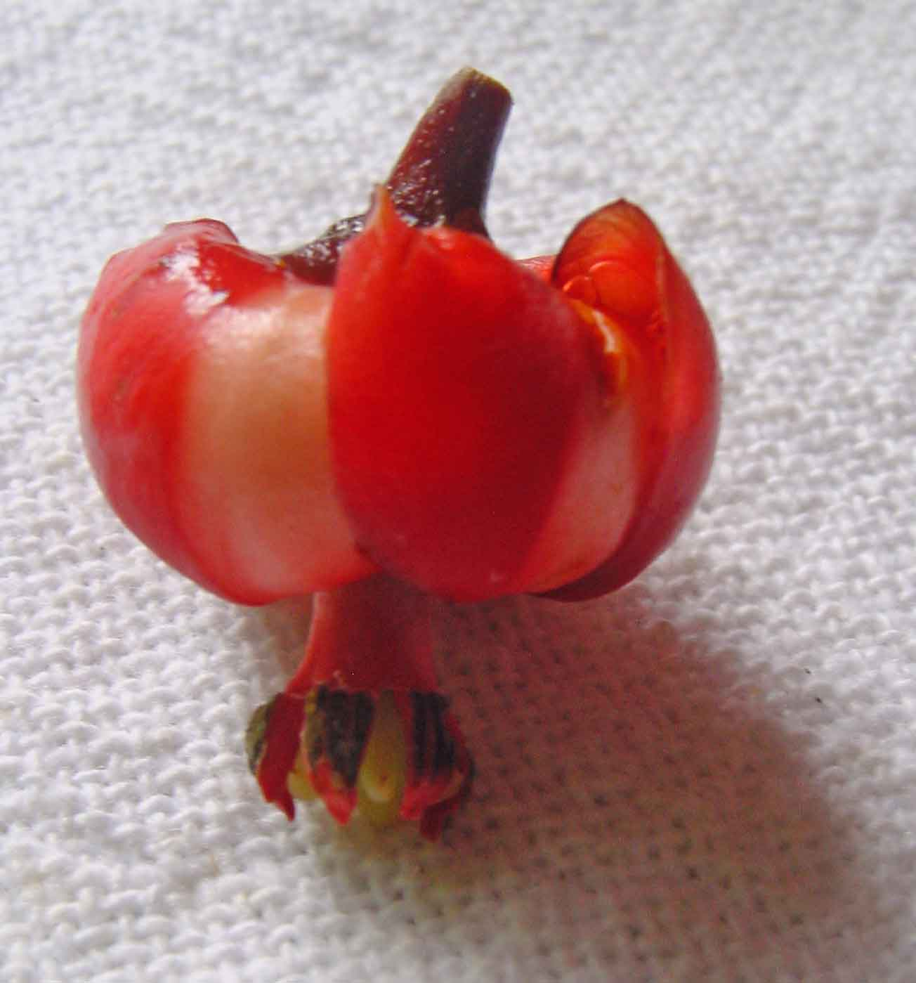 Symphonia globulifera L. f.